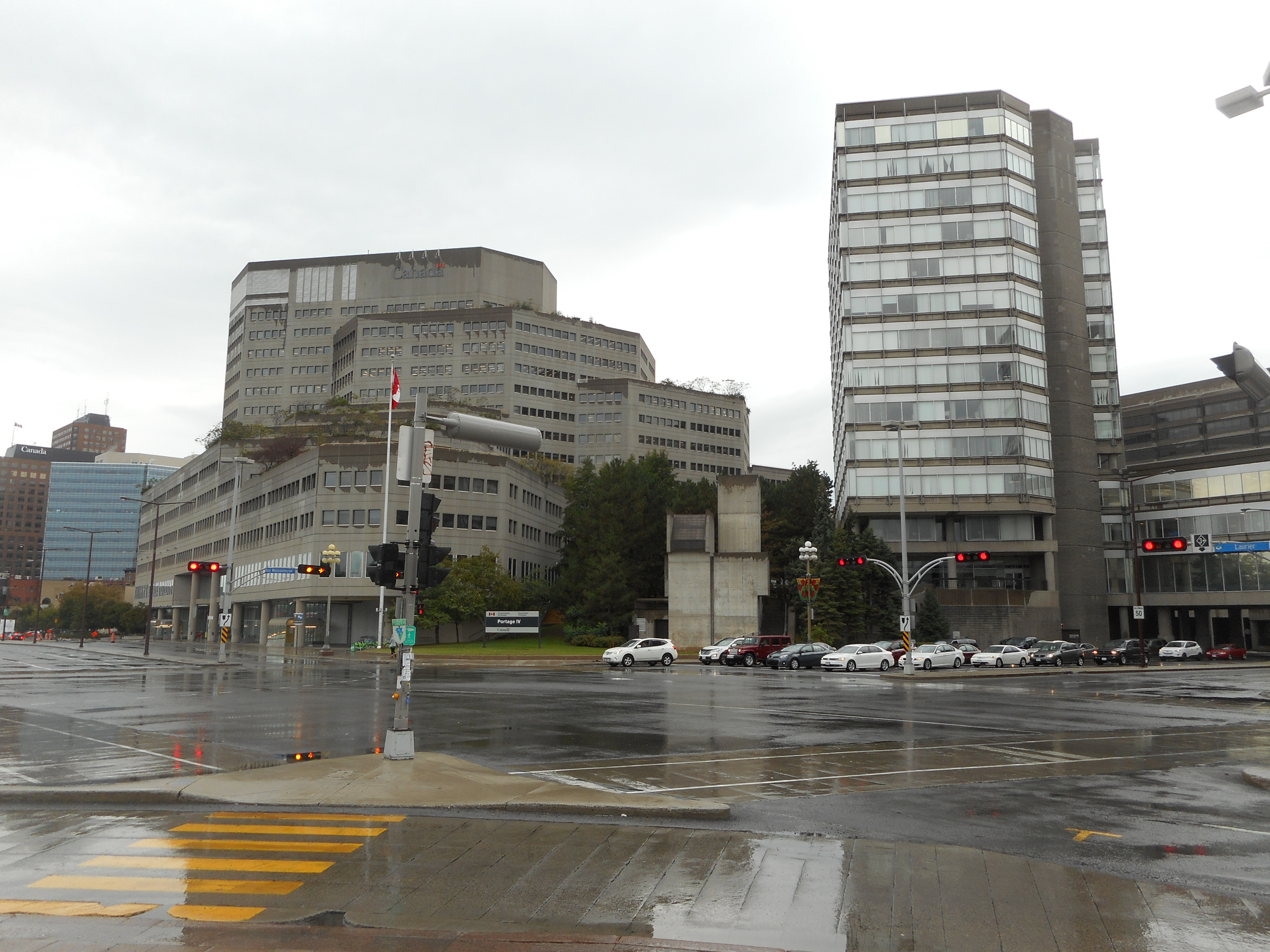 Portage IV (à gauche) et une partie de Portage III (à droite), Gatineau Vue à l'angle de la rue Laurier et du boulevard Maisonneuve